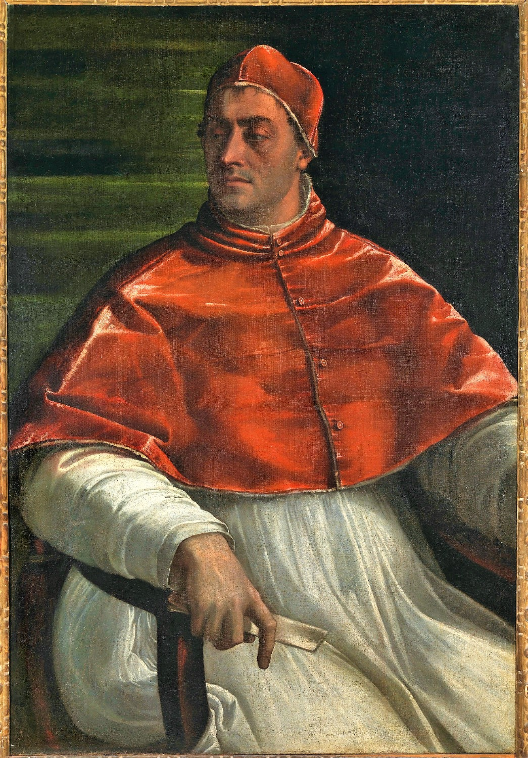 Il Ritratto di Clemente VII di Sebastiano del Piombo è un quadro (olio su tela, cm 145 x 100) che si trova a Napoli nel Museo di Capodimonte (inv. Q 147), facente parte della Collezione Farnese.